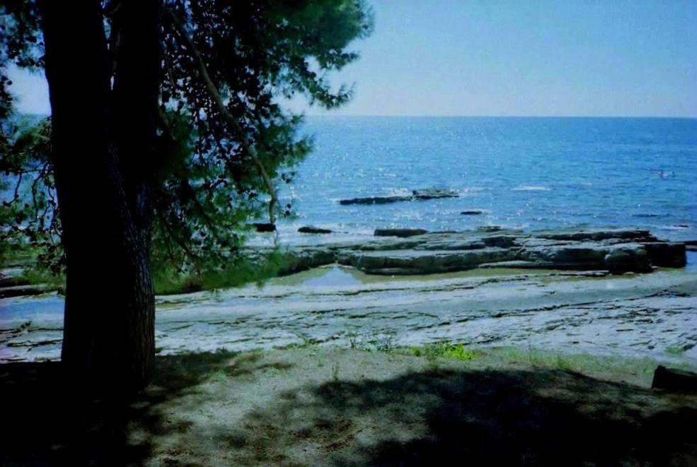 am Hotel